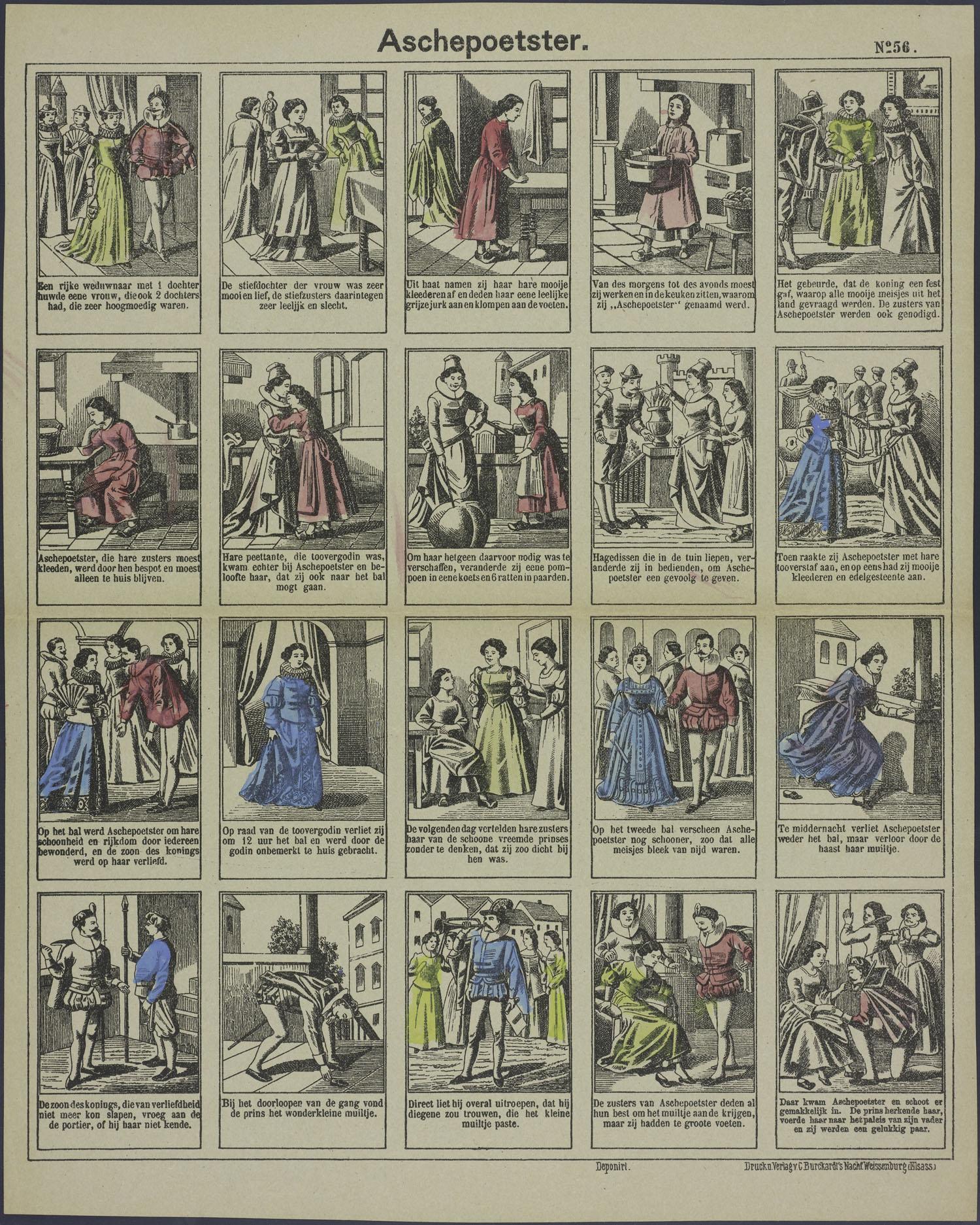 Centsprent met 4 x 5 omkaderde litho's met het verhaal van Assepoester, die door haar stiefmoeder en trotse stiefzussen slecht wordt behandeld. Ze strijkt hun kleding, kapt en kleedt hen, maar mag niet mee naar het bal. Dan komt haar peettante, een schikgodin, en verandert een pompoen in een koets, en geeft Assepoester een baljurk. De prins is verrukt van haar, en om 12 uur verlaat ze het bal en is de betovering voorbij. Ze verliest haar glazen muiltje dat wordt gevonden door de prins, met wie zij een gelukkig paar vormt. Bevat drie- tot vierregelige onderschriften.